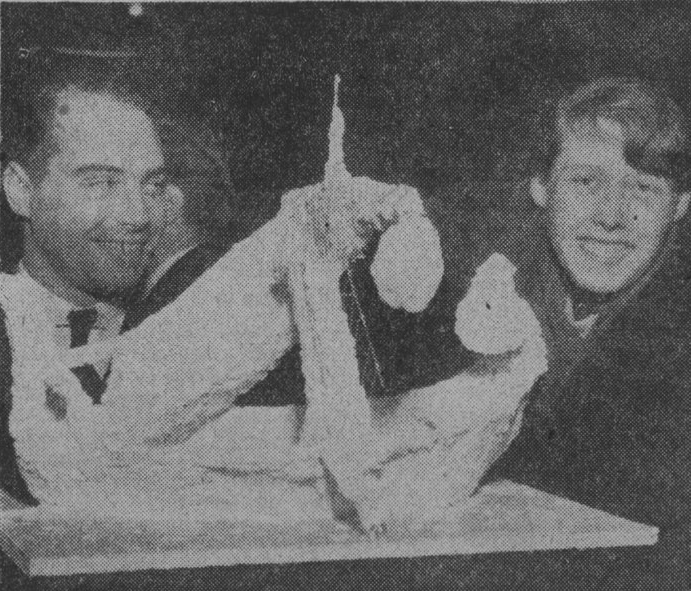 Immanuel Häusler & Kerstin Kjellberg med modell av betongskepp till lekplats i Skönstavik. Första pris i Konstakademins tävling för skulptur och arkitektklasserna